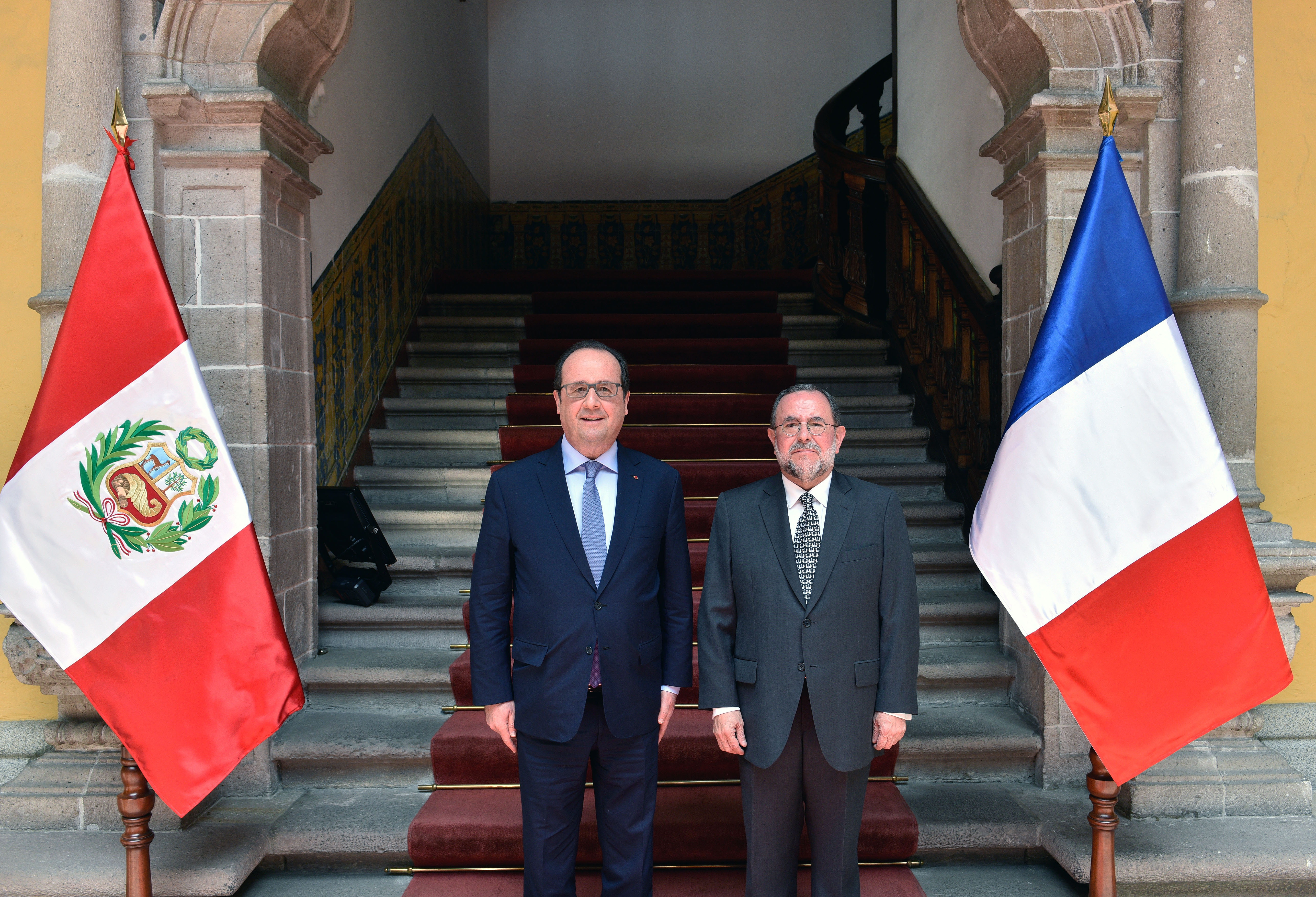 Esta tarde, en la sede de la Cancillería, el Viceministro de Relaciones Exteriores, Embajador Armando Patiño, recibió al Presidente de la República Francesa, François Hollande, quien dio declaraciones a la prensa de su país y luego realizó un recorrido en el Palacio de Torre Tagle para luego dirigirse a Palacio de Gobierno.